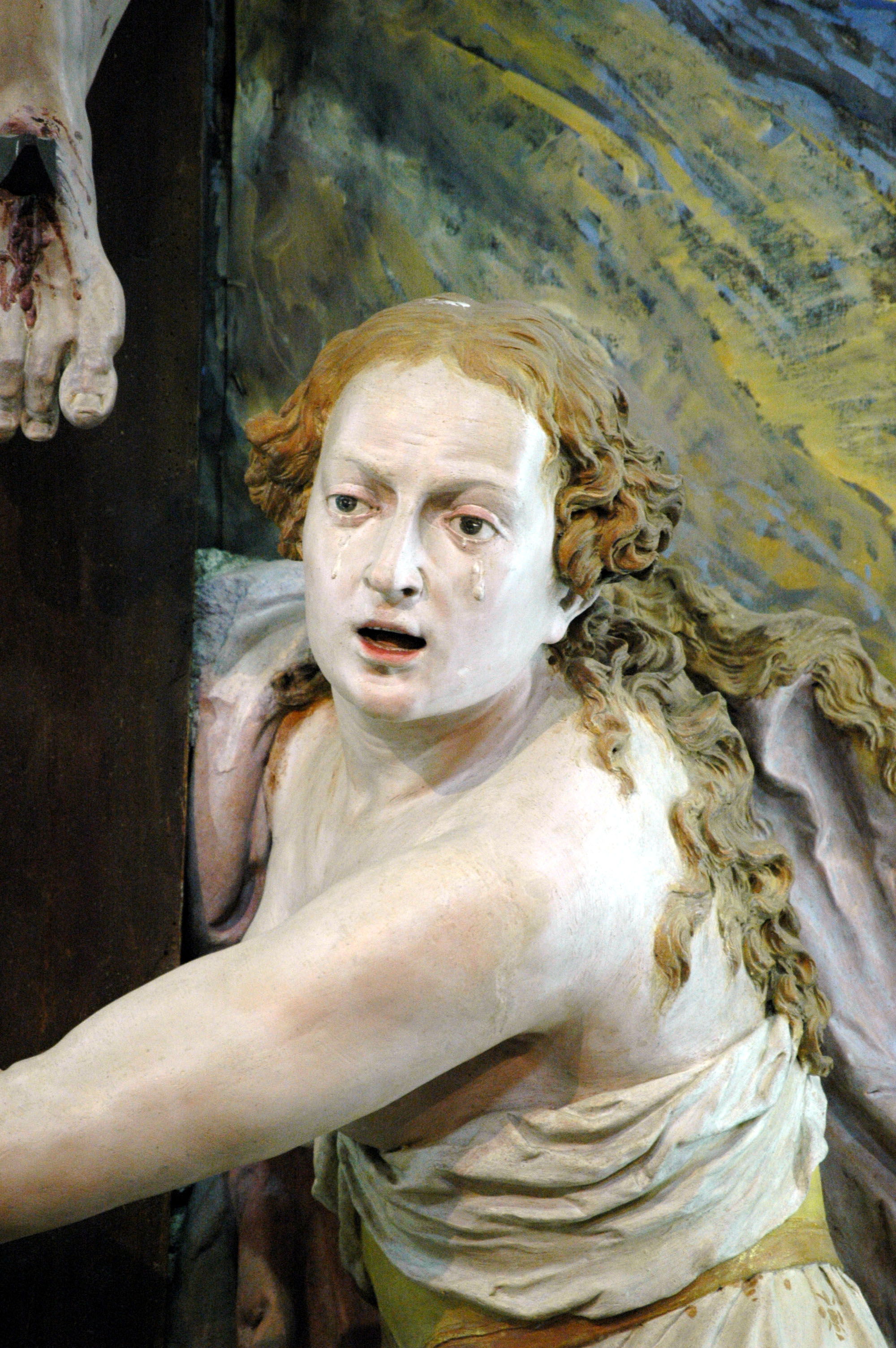 Sacro Monte di Domodossola. - Dionigi Bussola, Maria Maddalena ai piedi della Croce. Dettaglio della Crocefissione della cappella 11.